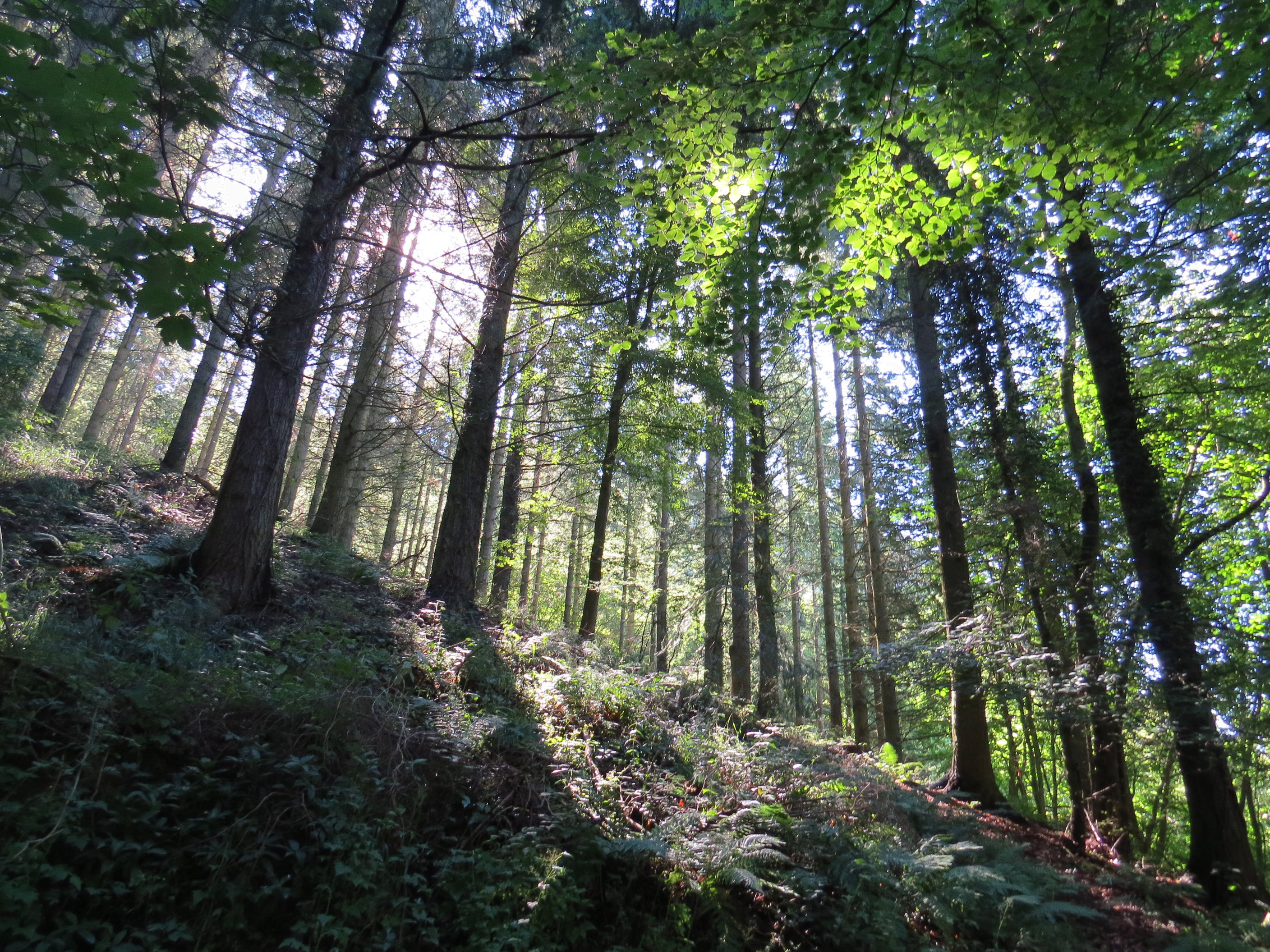 Coed ar waelod Bryn Breuddin